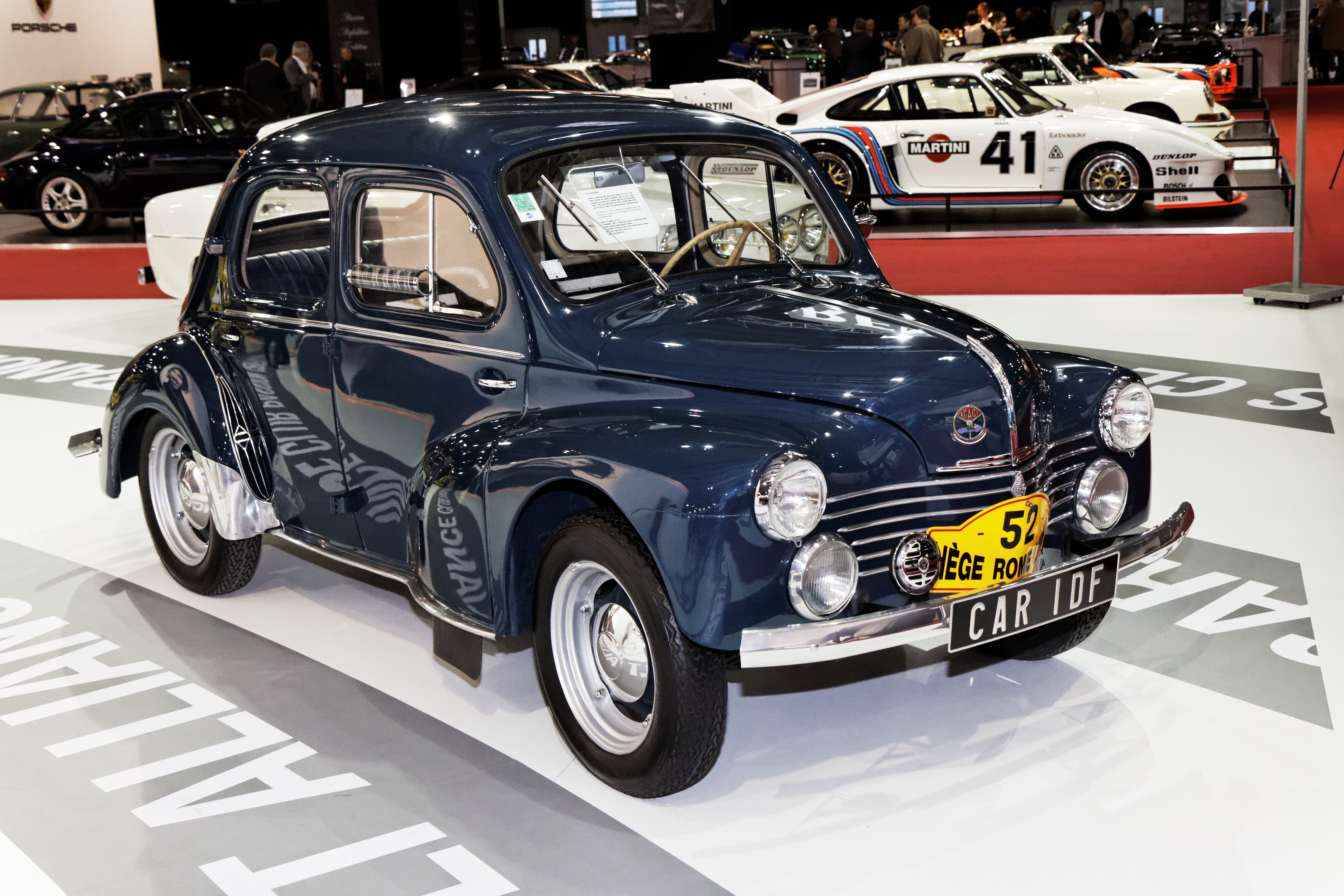 Une Renault 4CV présentée lors du salon Retromobile 2013.